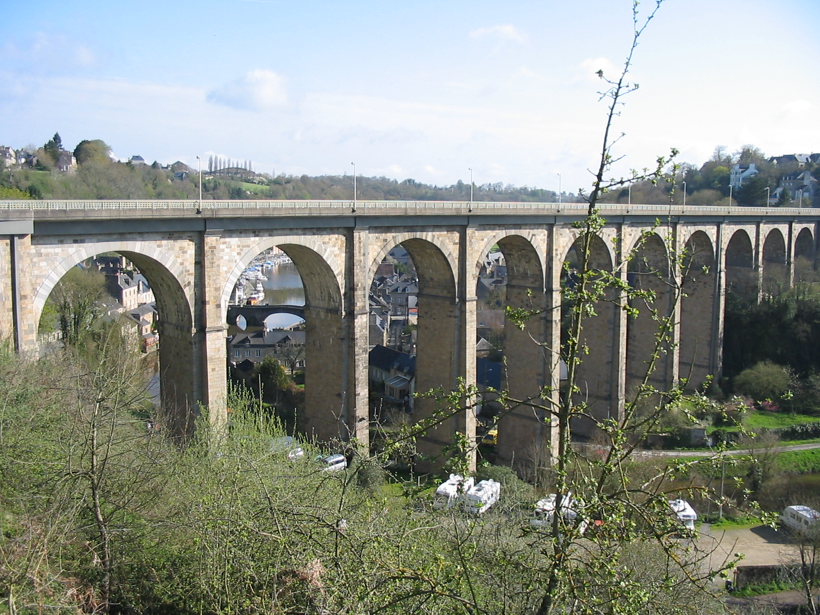 Viaduc de Dinan (Côtes d'Armor, France) sur la Rance